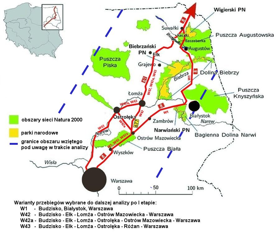 Mapa alternatywnych przebiegów trasy Via Baltica na odcinku Warszawa-Budzisko po pierwszym etapie analizy zrealizowaną przez firmę konsultingową "Scott&Wilson". Aktualizacja rozszerzenia mapy Tomasza Cofty (jest zgoda autora [1]).